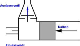 Kreiselpumpe, Ausstoßen der Flüssigkeit